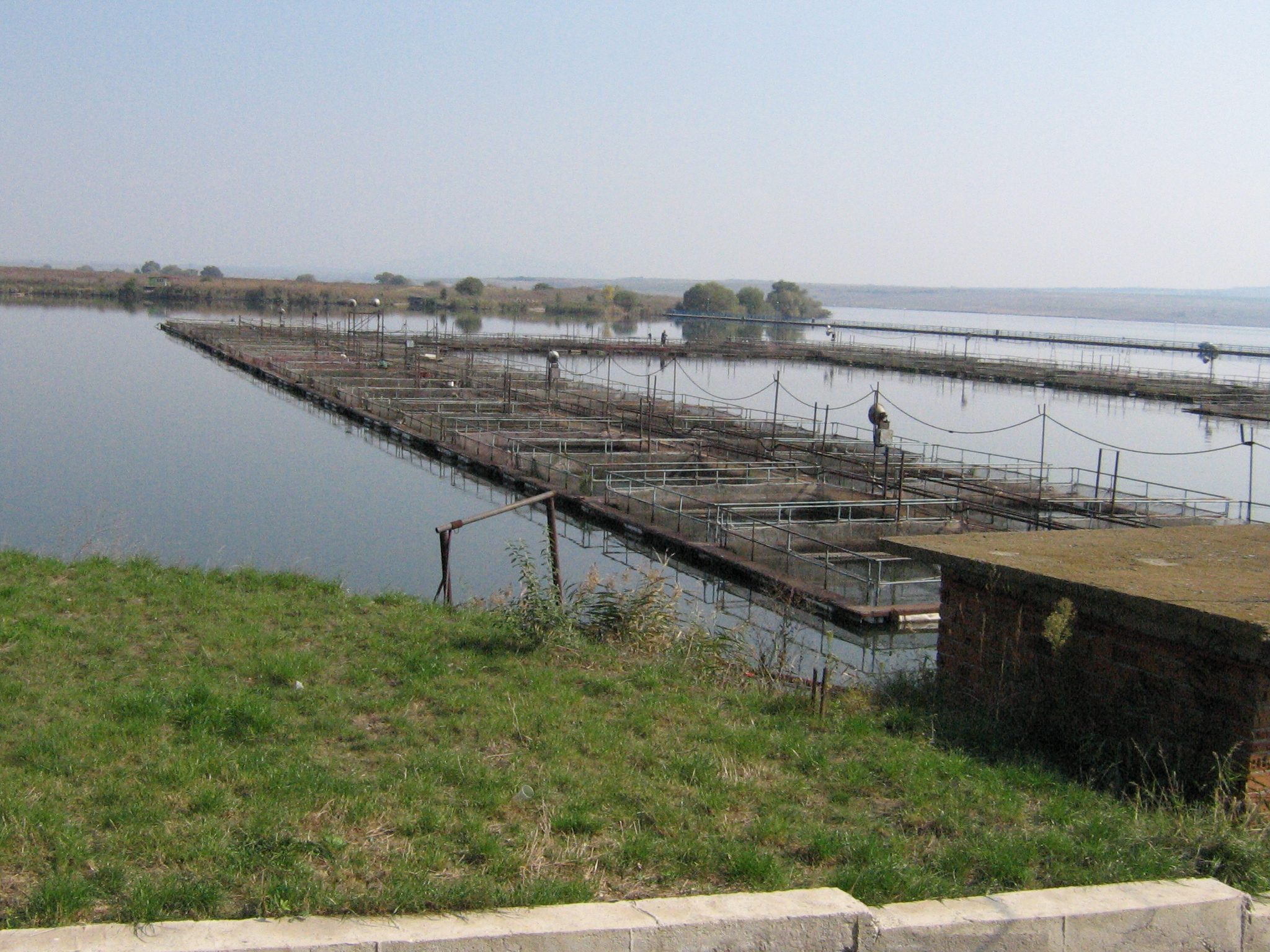 Садково стопанство в язовир "Овчарица"